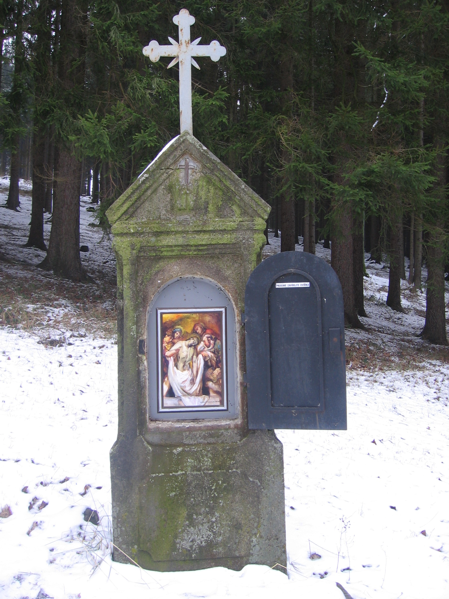 Zastavení křížové cesty u kaple Bolestné Panny Marie u Dobré Vody, Pocinovice, okres Domažlice